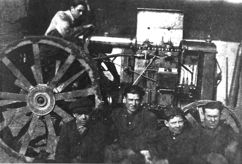 Francesco Cassani in età giovanile